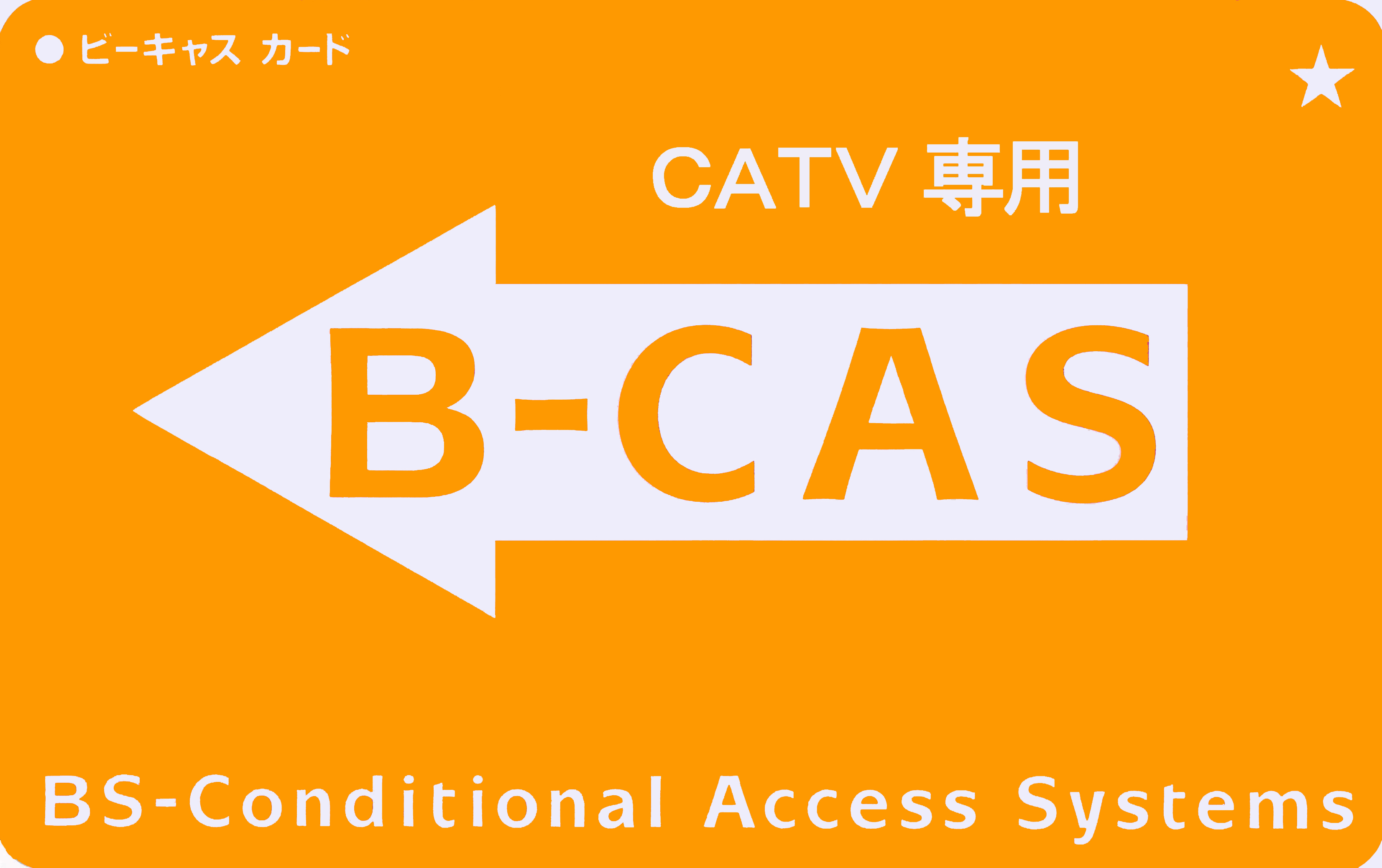 投稿者自身による作品